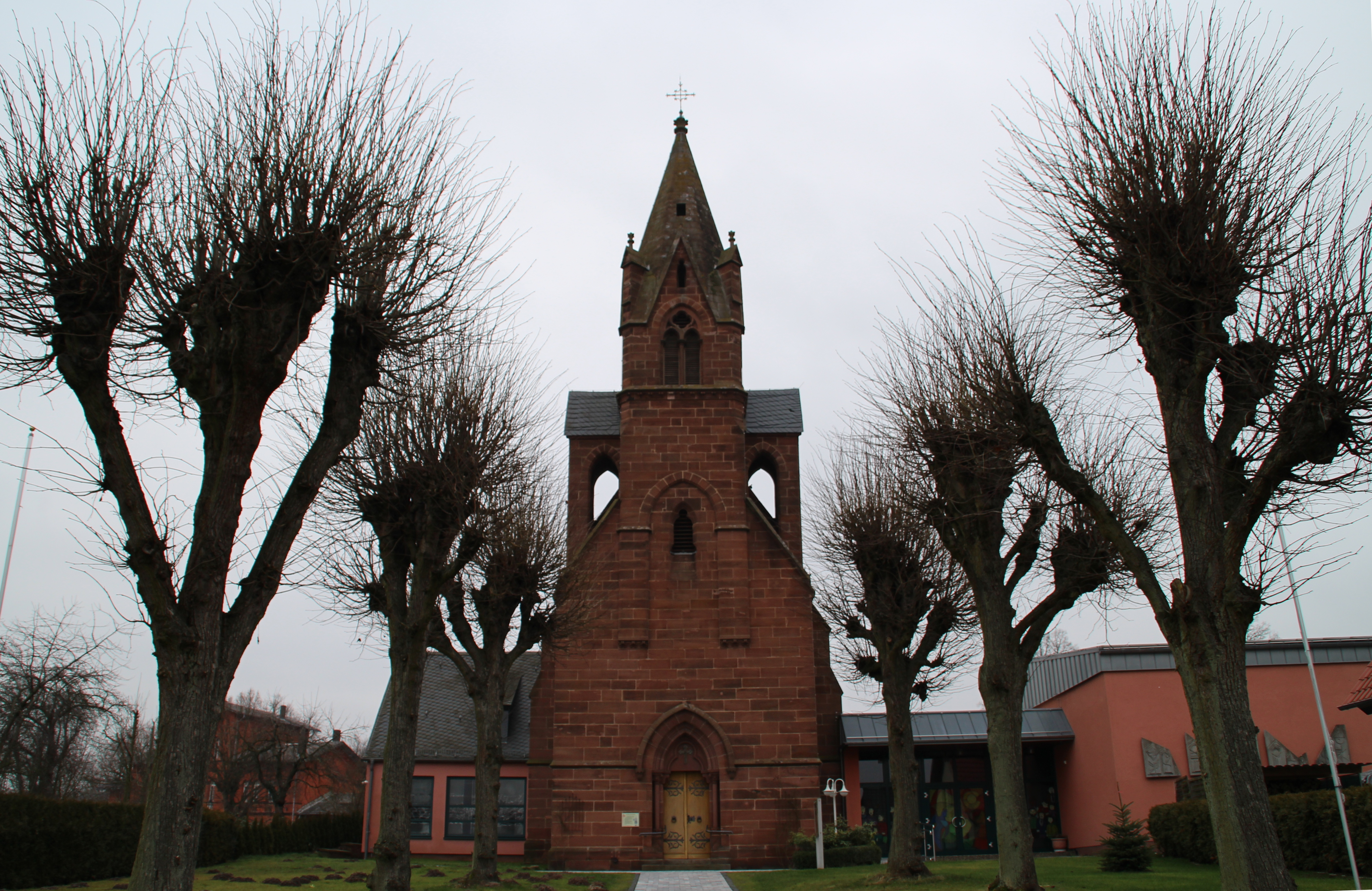 Ev. Kirche in Neustadt (Hessen)